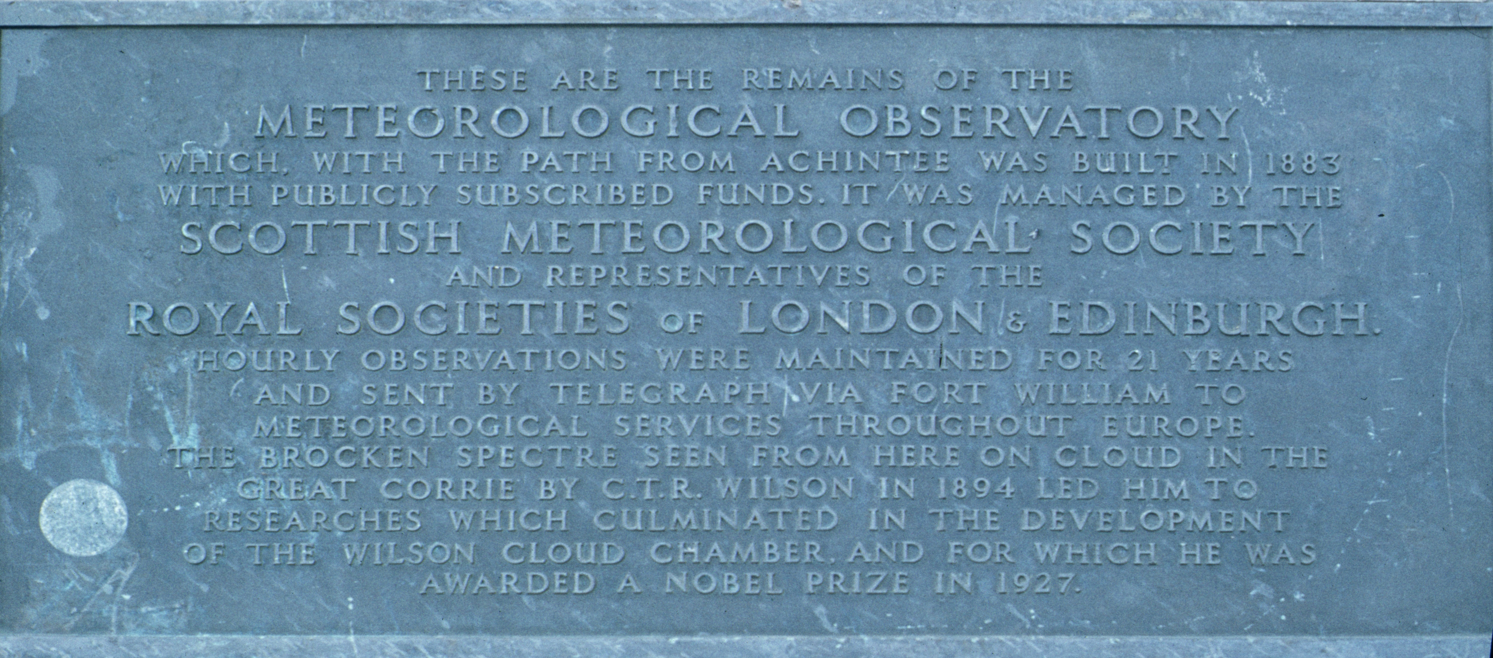 Gedenkplakette auf dem Ben Nevis (Schottland) für das ehem. Observatorium. Die Beobachtungen hier inspirierten C. Wilson zur Entwicklung der Nebelkammer.